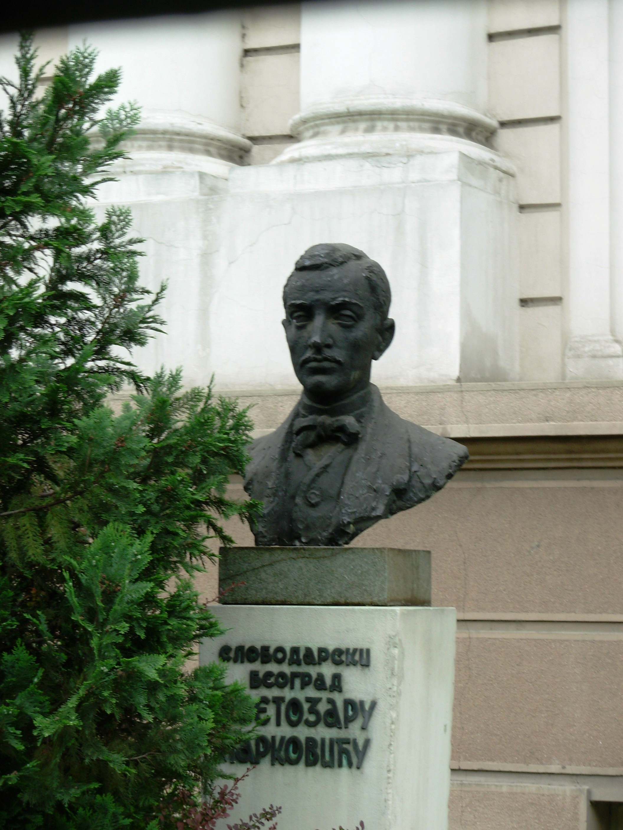 Споменик Светозару Марковићу испред истоимене универзитетске библиотеке у Београду. Сликао Голдфингер